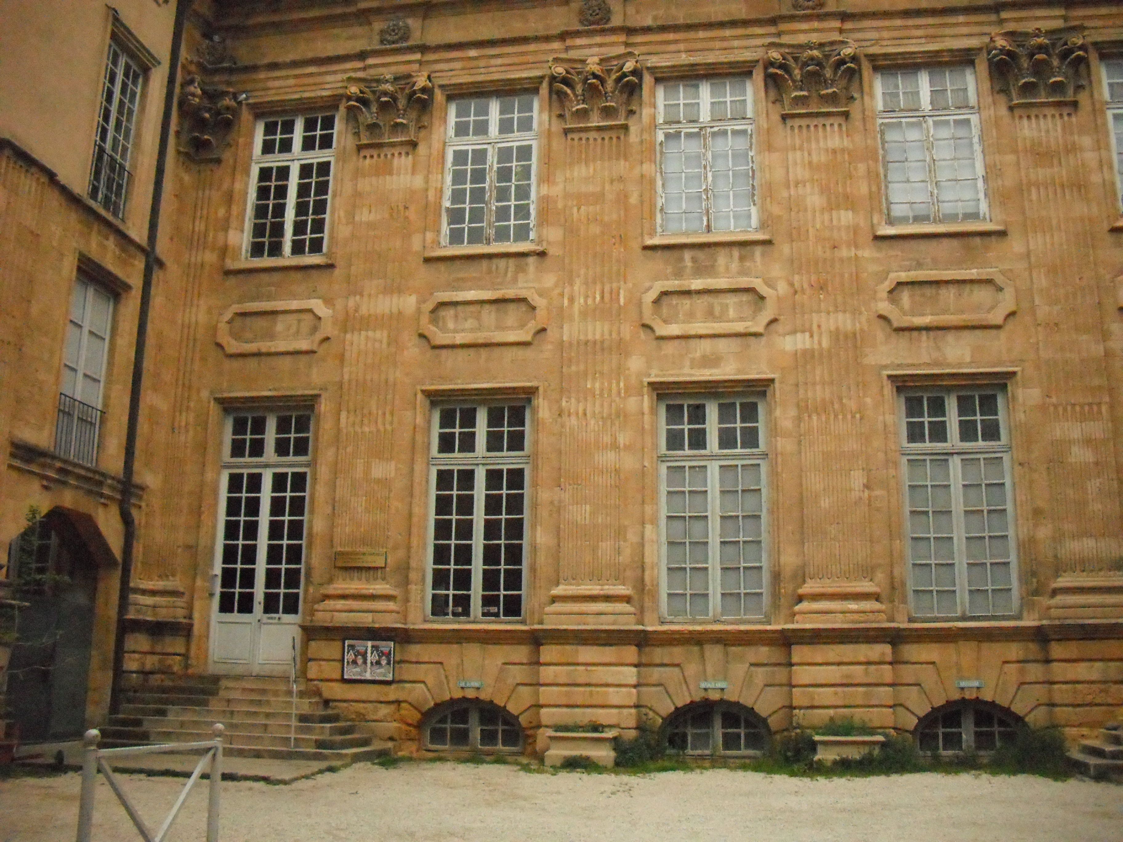 Hôtel Boyer-d'Éguilles, à Aix-en-Provence, siège du muséum d'histoire naturelle.